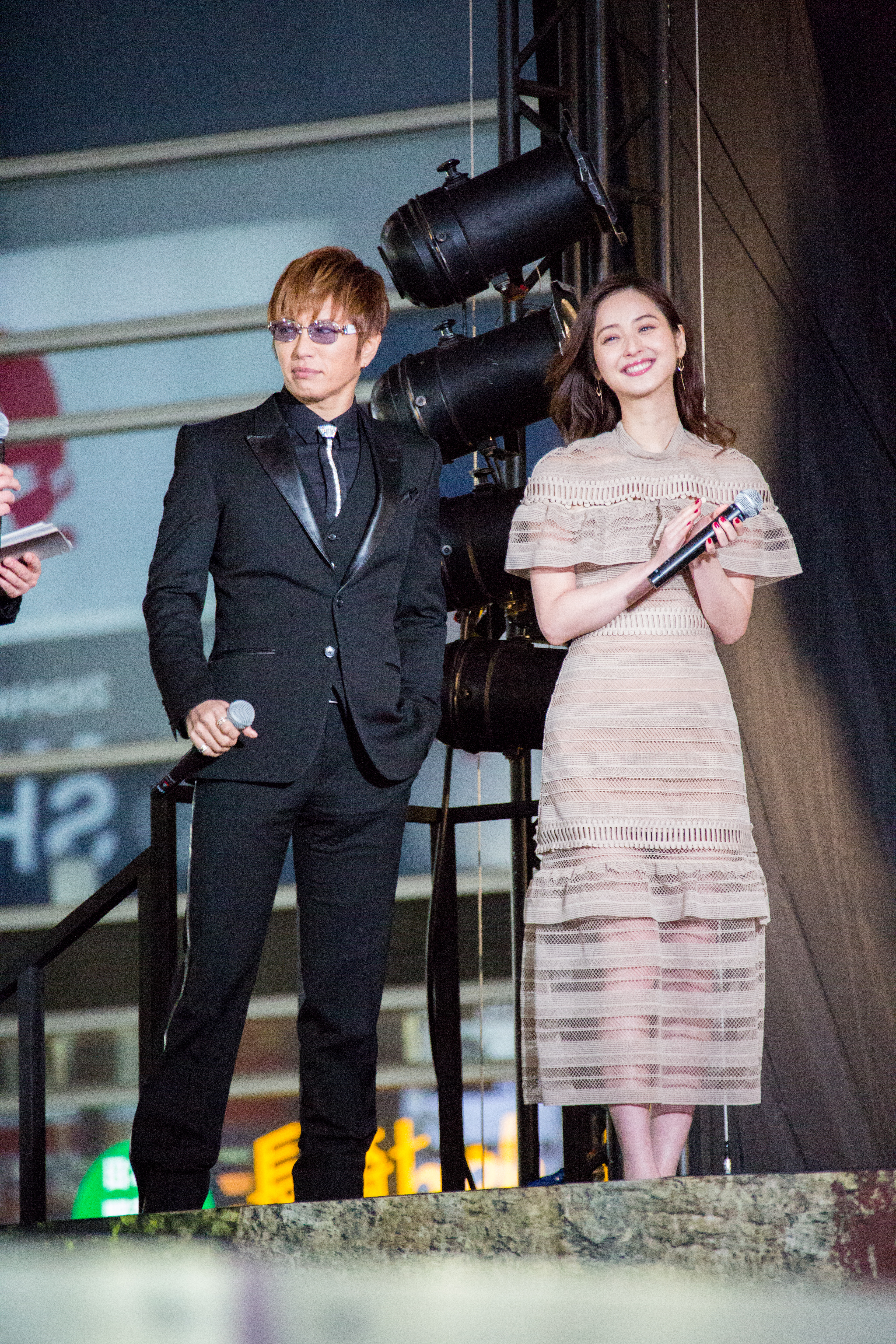 キングコング: 髑髏島の巨神 ジャパンプレミア レッドカーペット GACKT 佐々木希